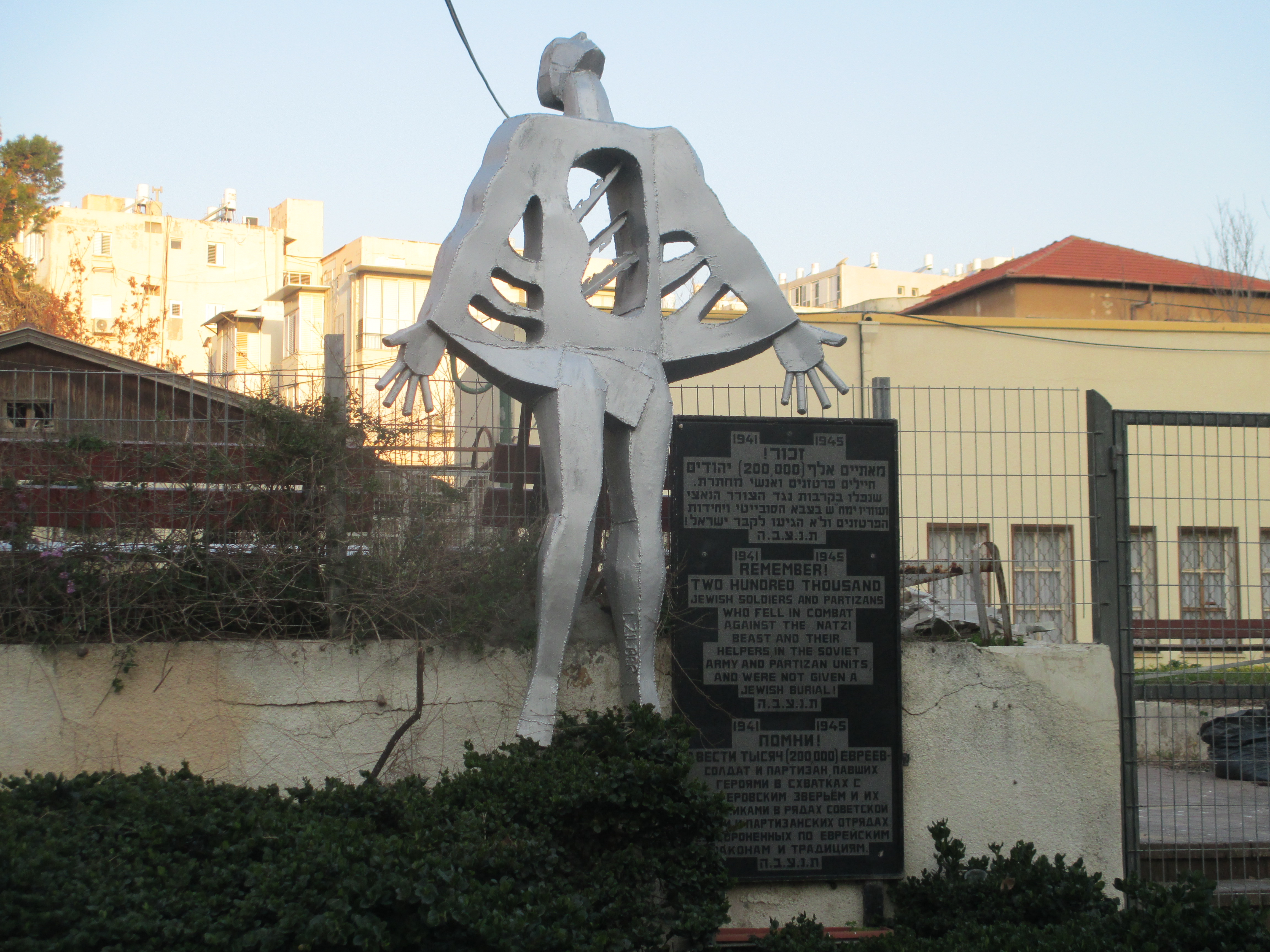 אנדרטה ללוחמים היהודים בצבא האדום במלחמת העולם השנייה. רחוב הרב קוק 11 בנתניה. הפסל - ליאוניד זילבר